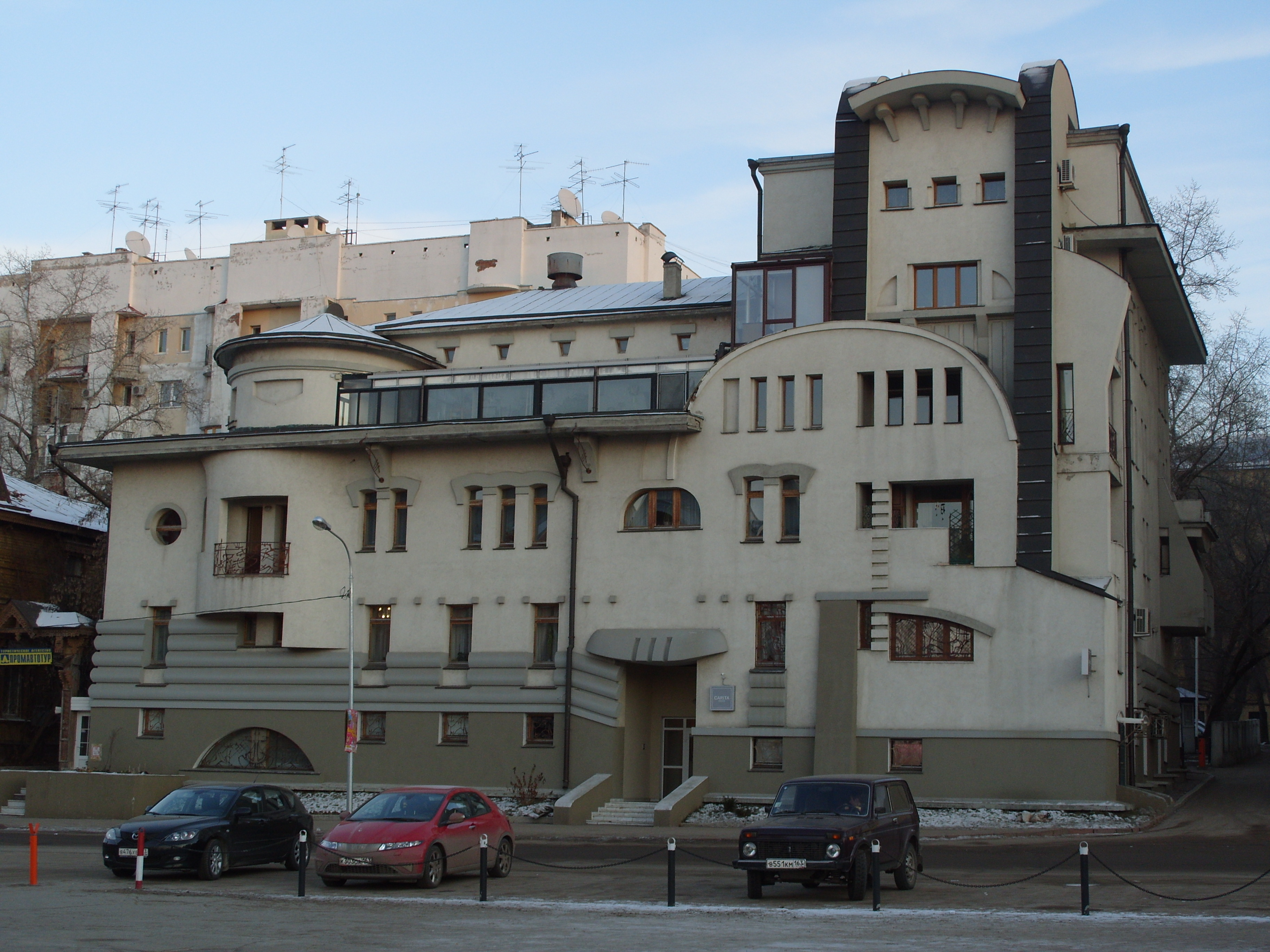 Frunze st., Samara